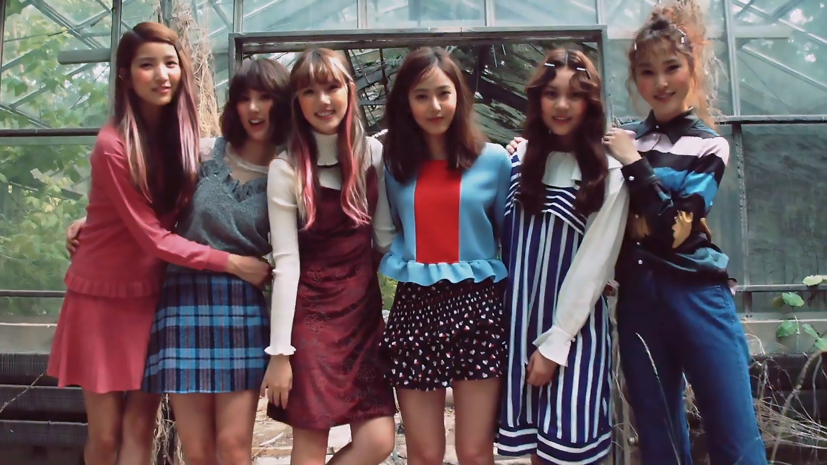 [Marie Claire Korea] 여자친구가 이룬 꿈